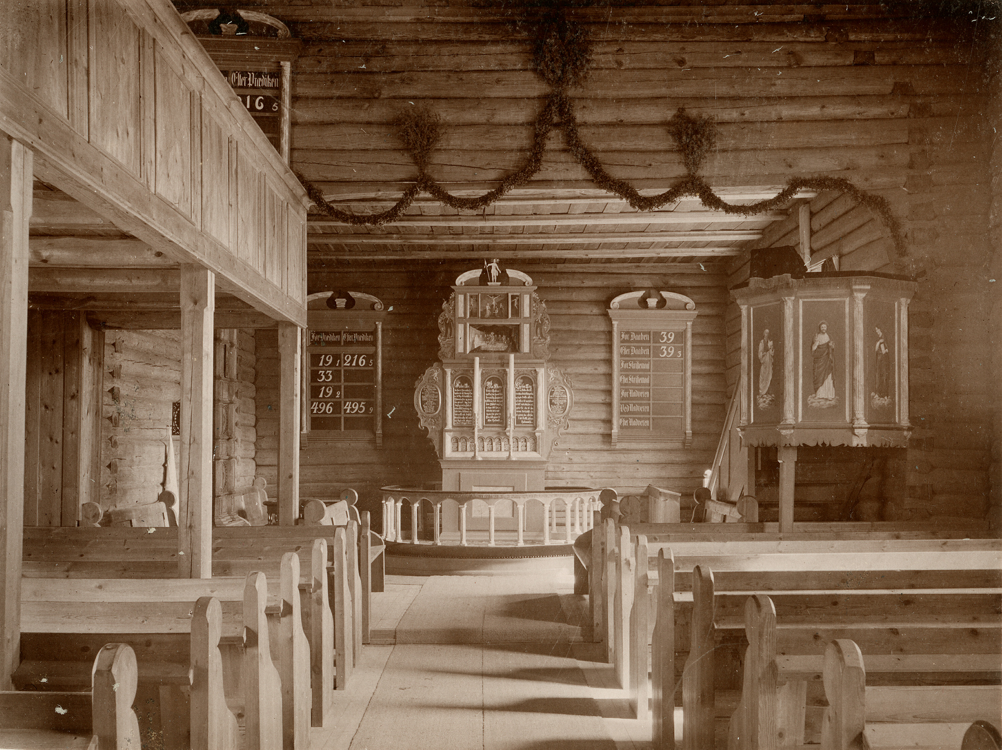 Interiør i Mari kirke, Ytre Enebakk. Fra Kulturminnebilder.no.